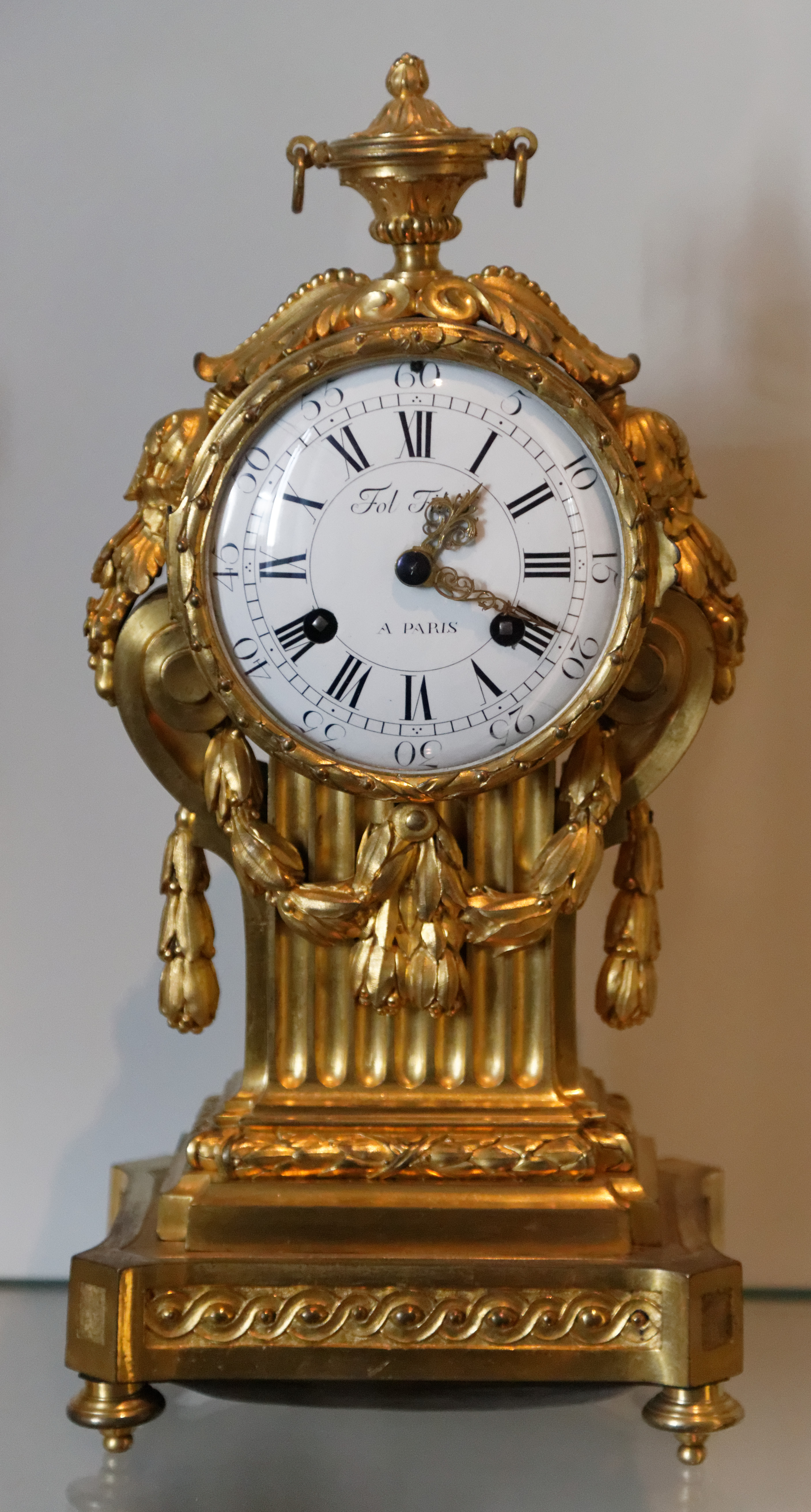 Pendule, attribuée à Robert Osmond ; mouvement de Jean II Fol dit Fol Fils. Paris, vers 1770. Bronze fondu, ciselé et doré. Collection Grandjean, legs Louise Alexandrine Grandjean, 1923, inventaire GR 116 Musée des Arts décoratifs, Paris